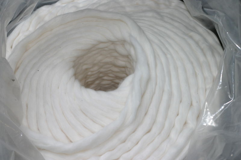 Pramen od protahovaciho stroje